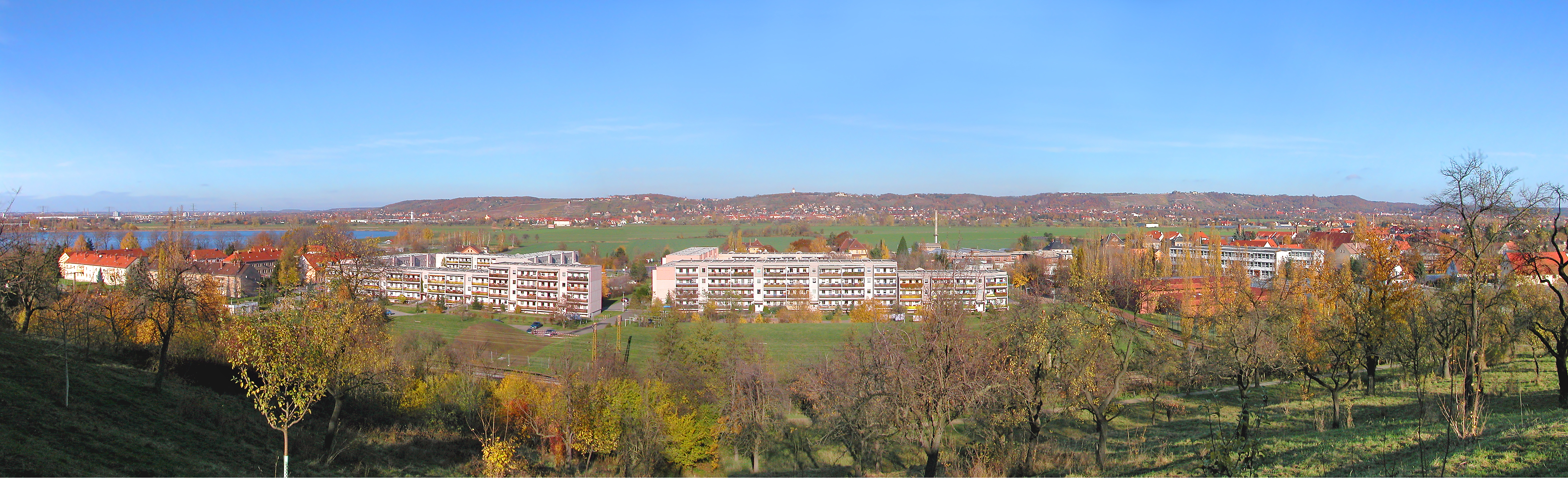 15.11.2006 01156 Cossebaude (Dresden): Blick von Cossebaude zu den Radebeuler Elbhängen. Links der untere Stausee des Pumpspeicherwerkes Niederwatha. In Bildmitte am Horizont der Wasserturm Radebeul. Im rechten Drittel Bismarckturm und Spitzhaus. [DSCN2732-2734.TIF]20061115180MDR(c)Blobelt